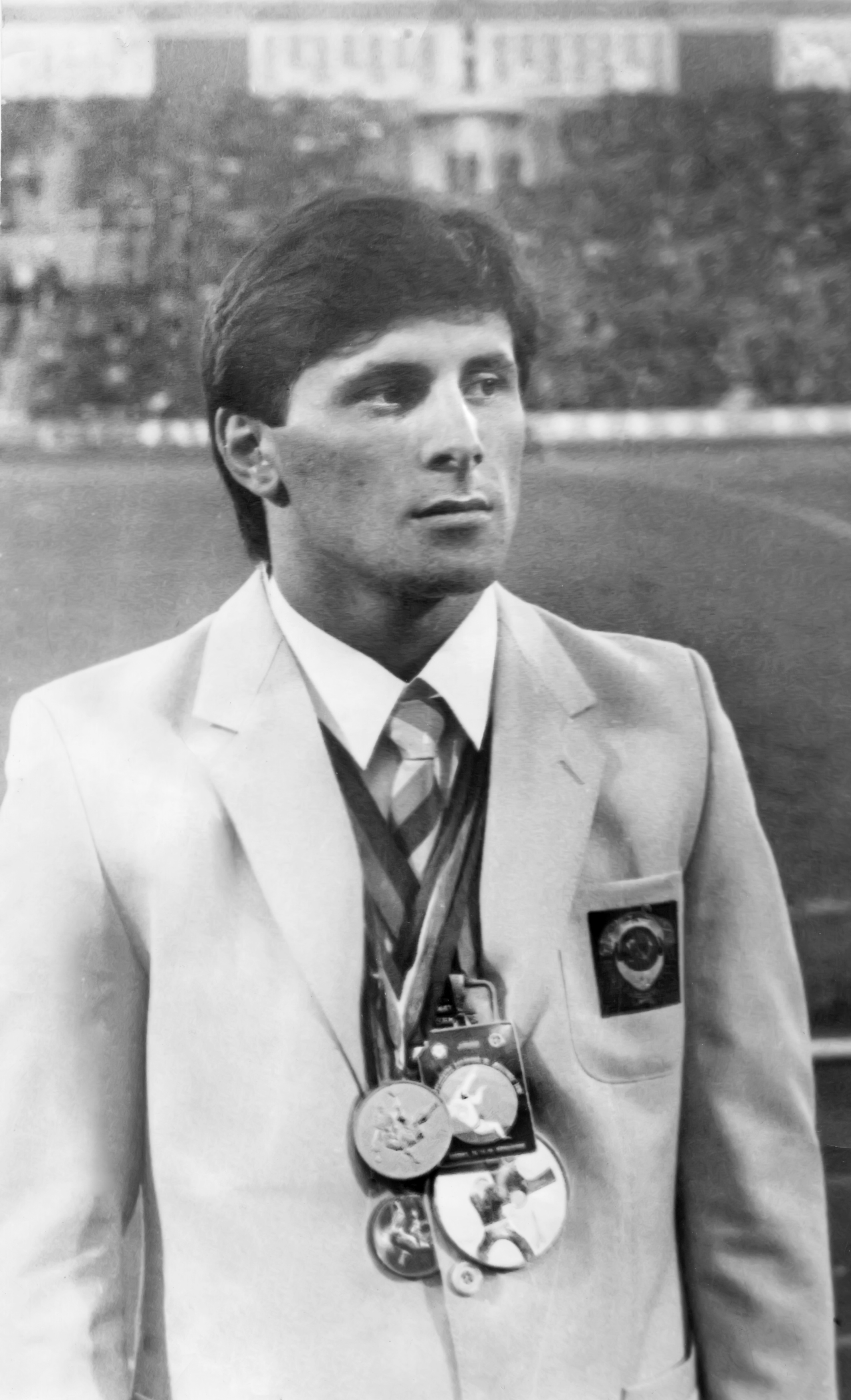 Стадион Динамо Минск